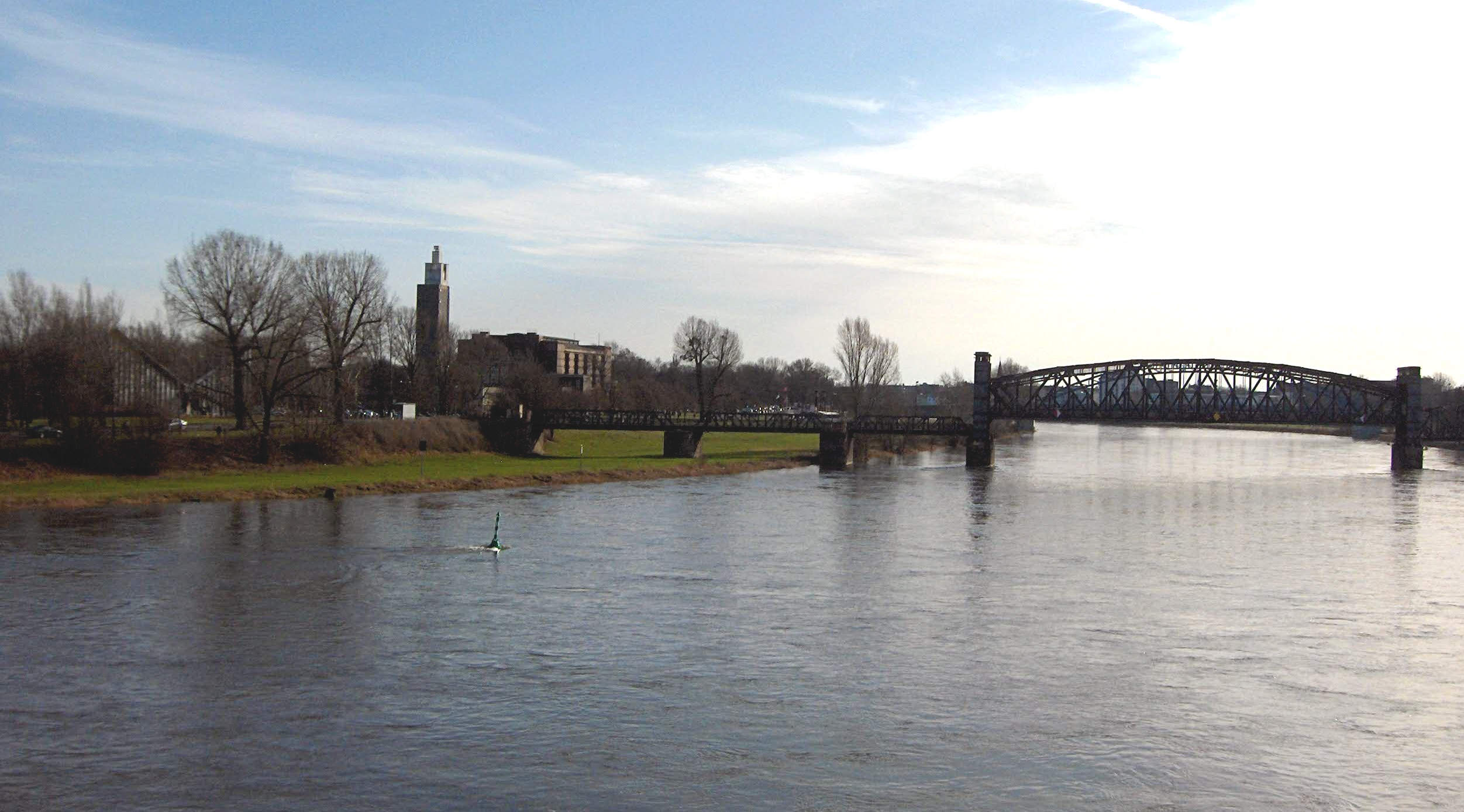 Blick von der Füßgängerbrücke am Schleinufer hinüber zum Stadtpark, mit dem Ausstellungsturm. Rechts davon die Stadthalle und die alte Hubbrücke.